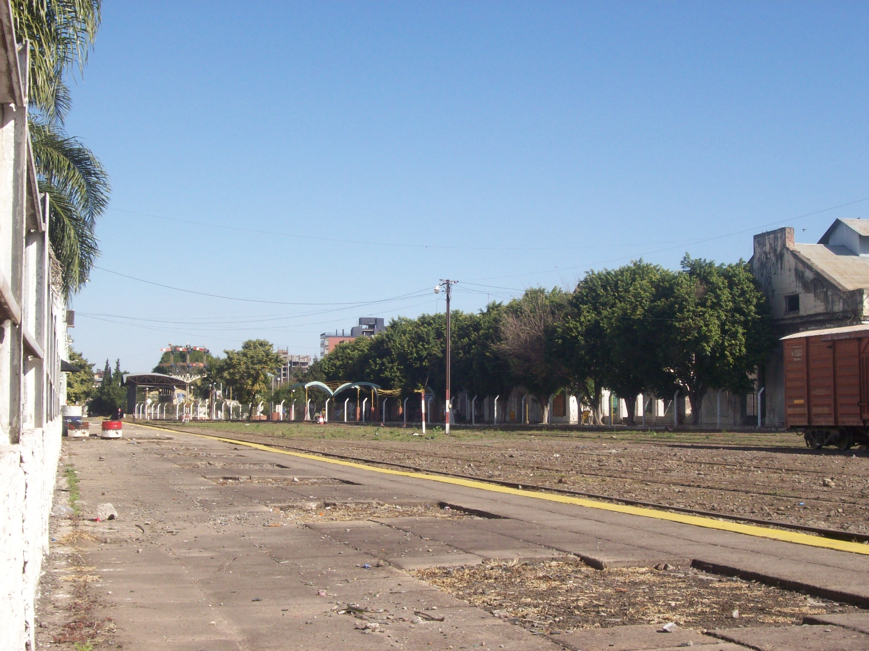 Andén estación Ferrocarril Central Córdoba de la ciudad de San Miguel de Tucumán hacia el sur, en la provincia de Tucumán, Argentina.